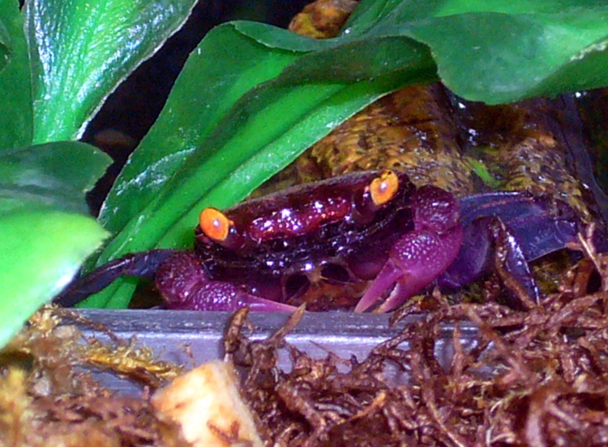 Possibly Geosesarma dennerle